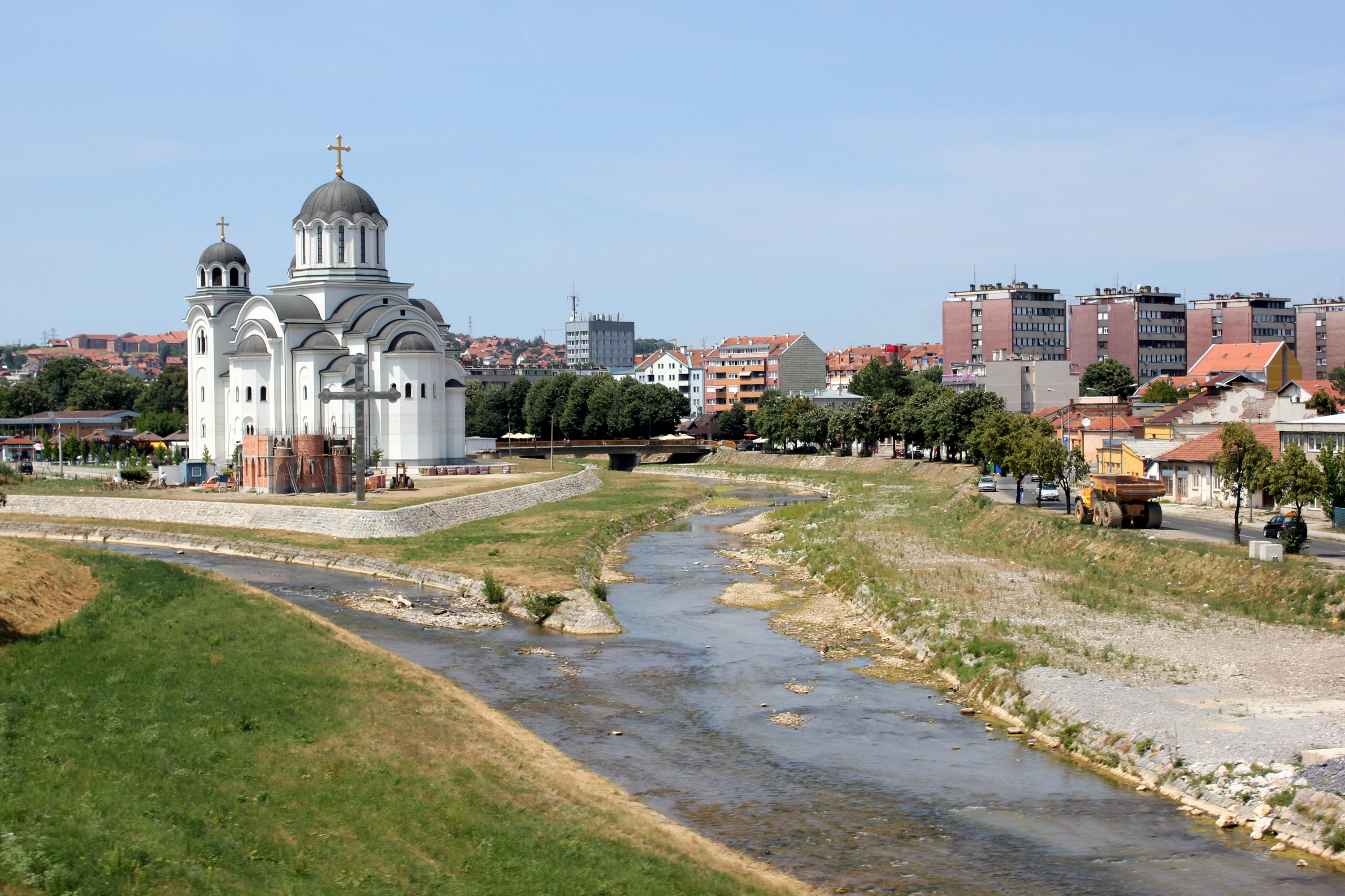 Orthodoxe Kirche am Zusammenfluss von Kolubara und Gradac in Valjevo, Serbien.